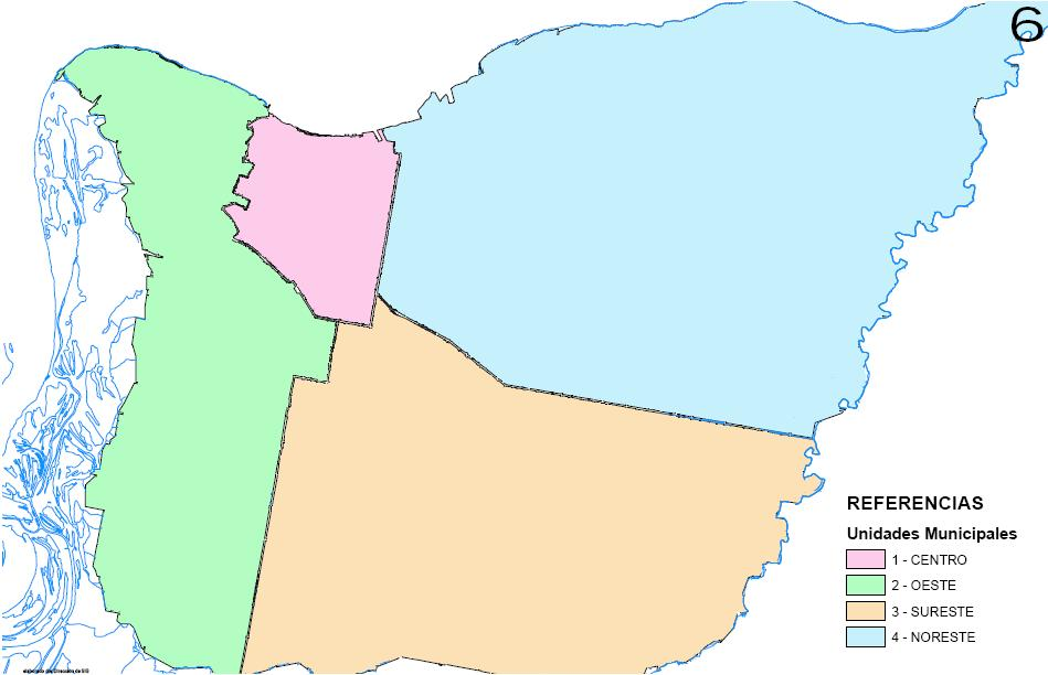 Descentralizacion